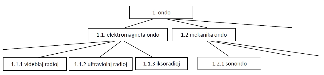 Ekzempla nocio-sistemo. Elektromagneta ondo kaj mekanika ondo estas tipoj de ondoj. Same, ikso-radioj, ultraviolaj radioj kaj videblaj radioj estas tipoj de elektromagnetaj ondoj, kaj sonondo estas tipo de mekanika ondo.